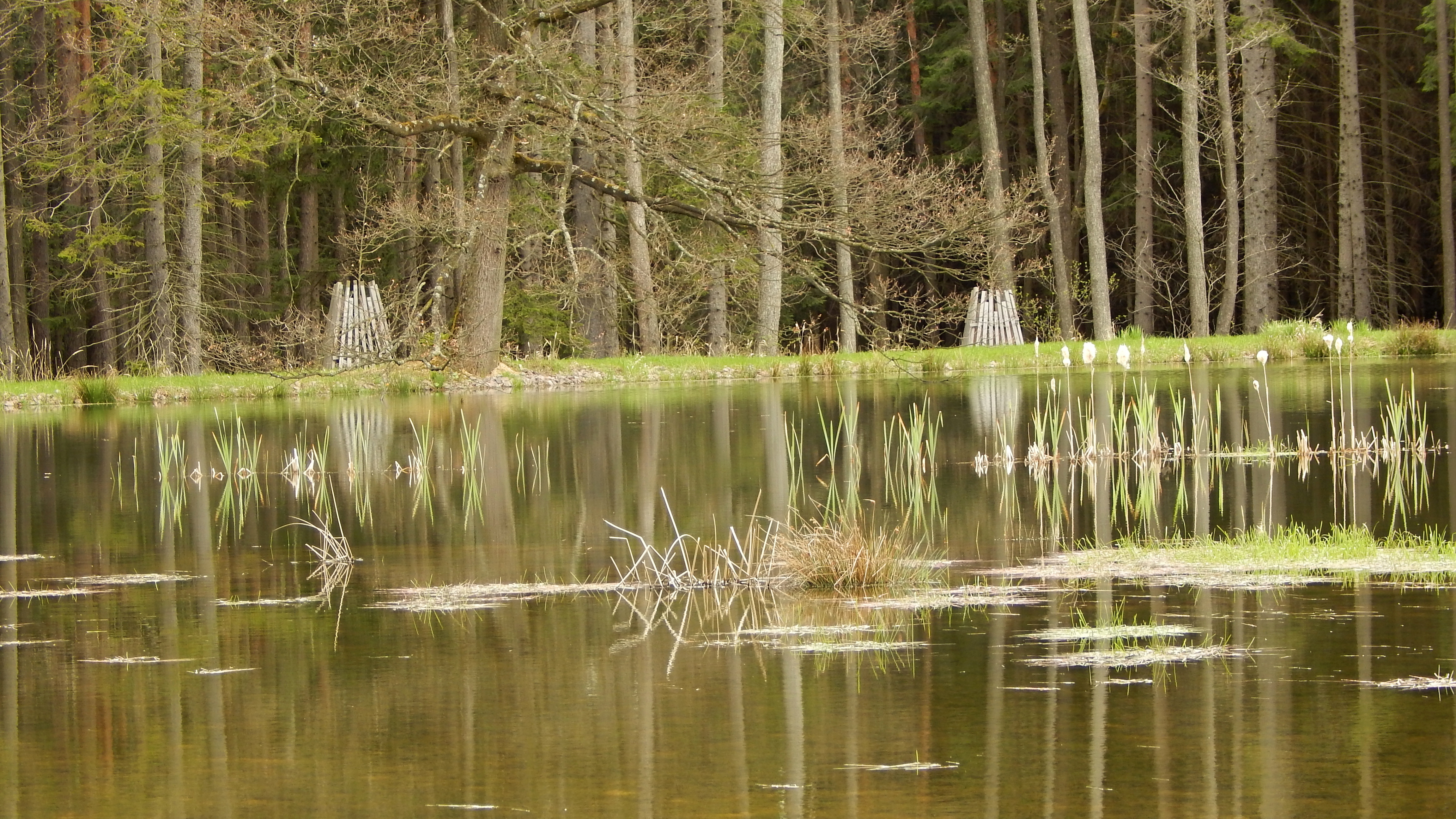 Rybník Boušovka prošel kompletním vyčištěním.